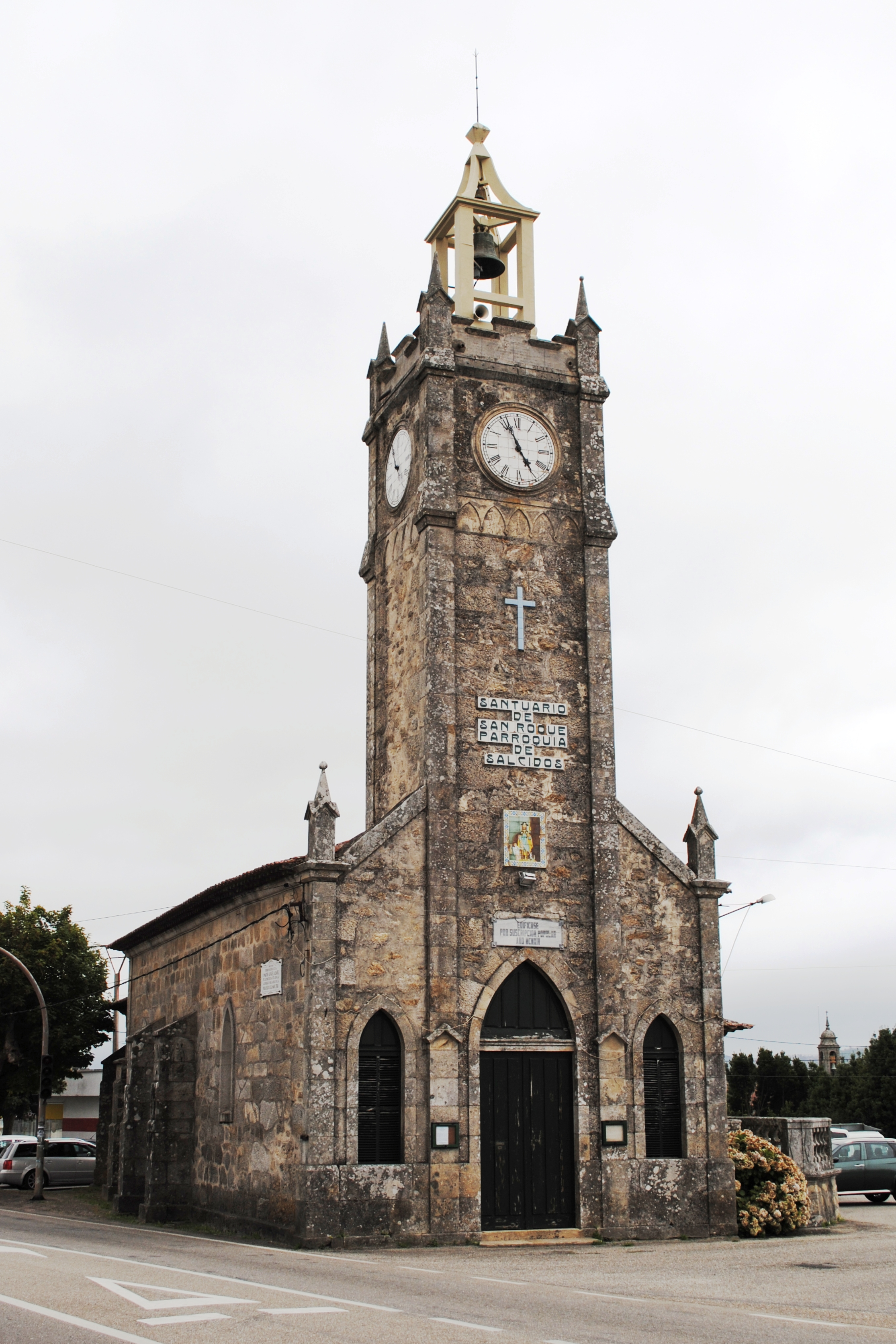 A Guarda, Salcidos, capela de S. Roque. De estilo neogótico construído no 1914, substituíu a antiga ermida do século XVII. Fronte a fachada érguese un artístico cruceiro do XVIII.